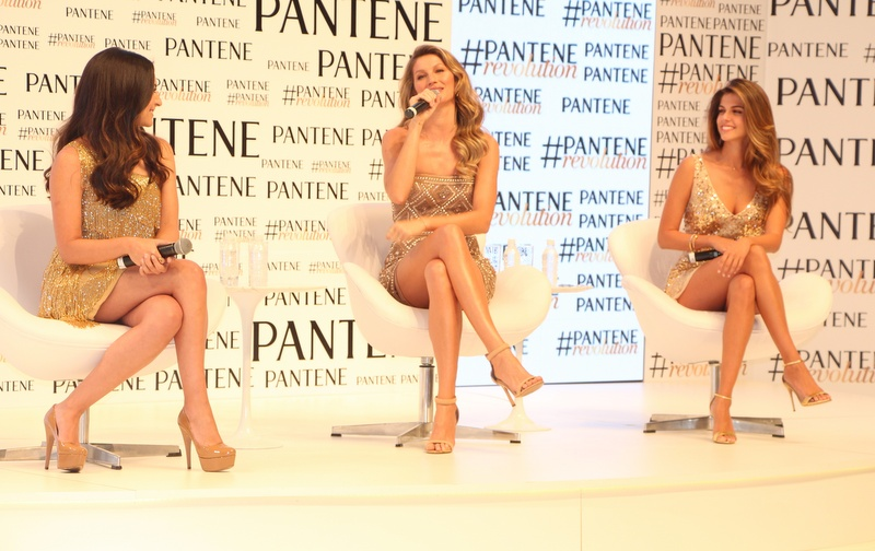 Embaixatrizes Pantene-002